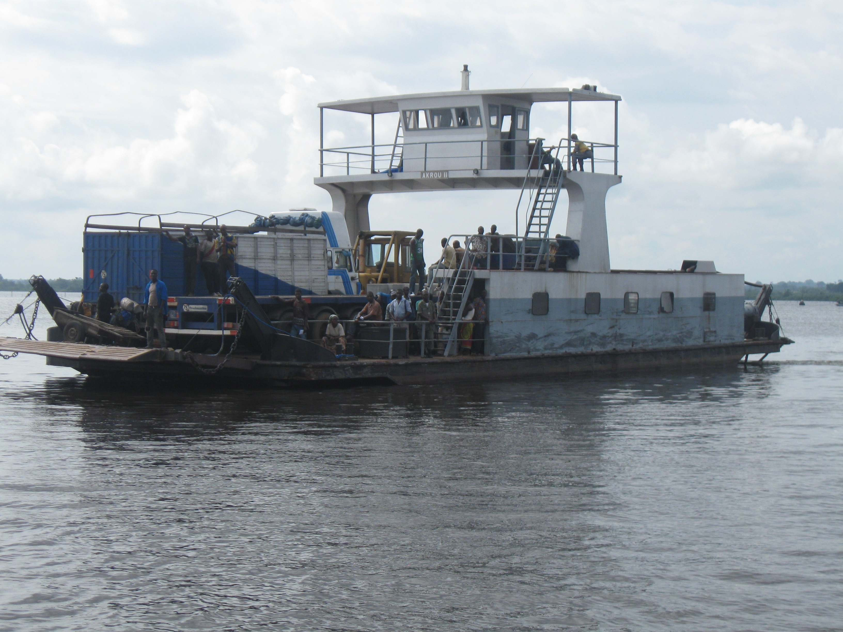 Bac de Jacqueville (Côte d'Ivoire)